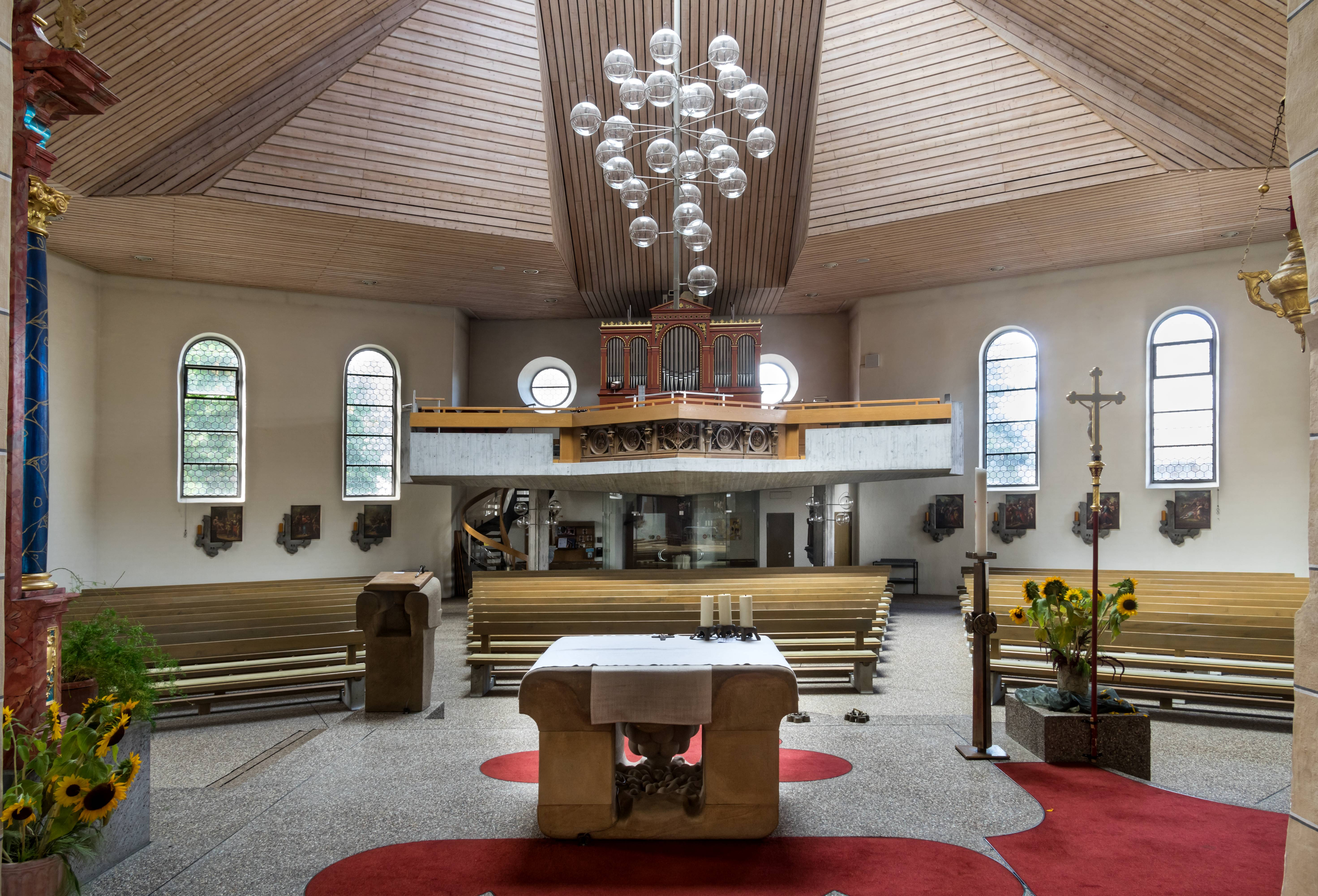 Bilder von St. Columba. in Pfaffenweiler Blick zum Haupteingang